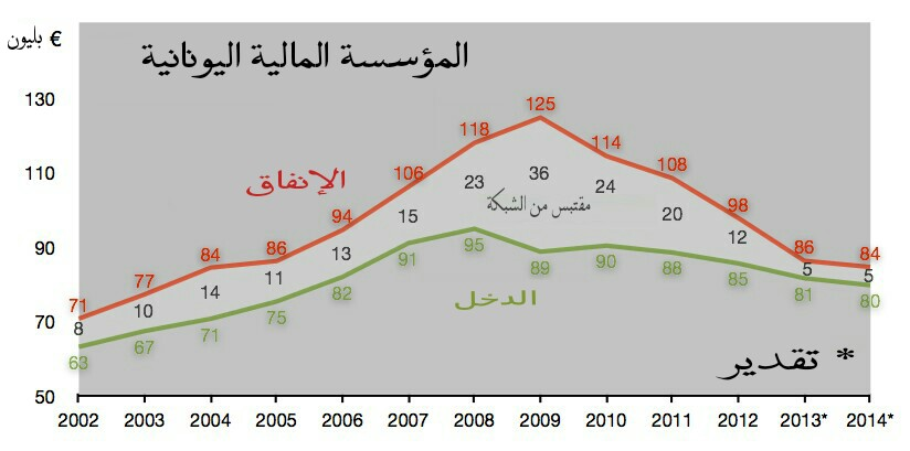 نسبة الدخل مقارنة مع الإنفاق في اليونان